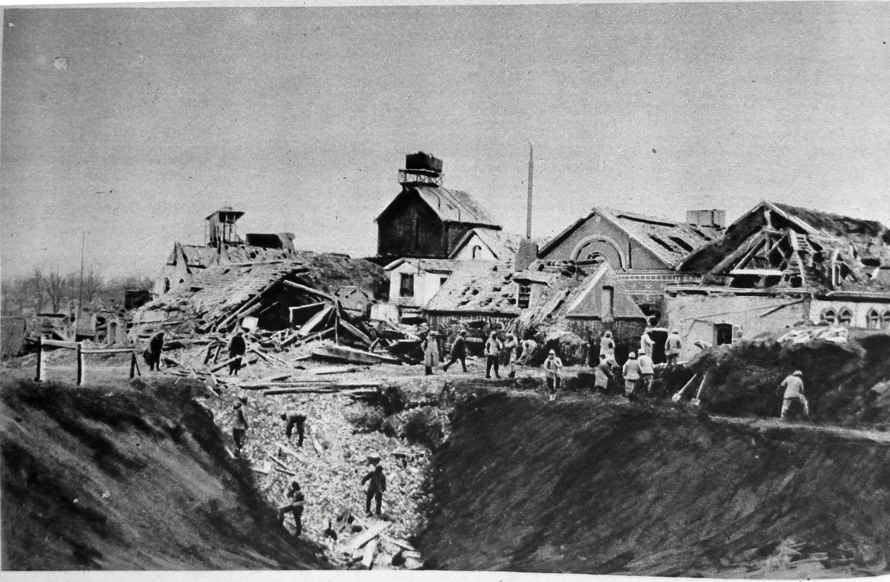 extrait du journal "le miroir".